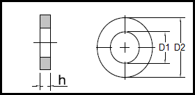 DIN 7989